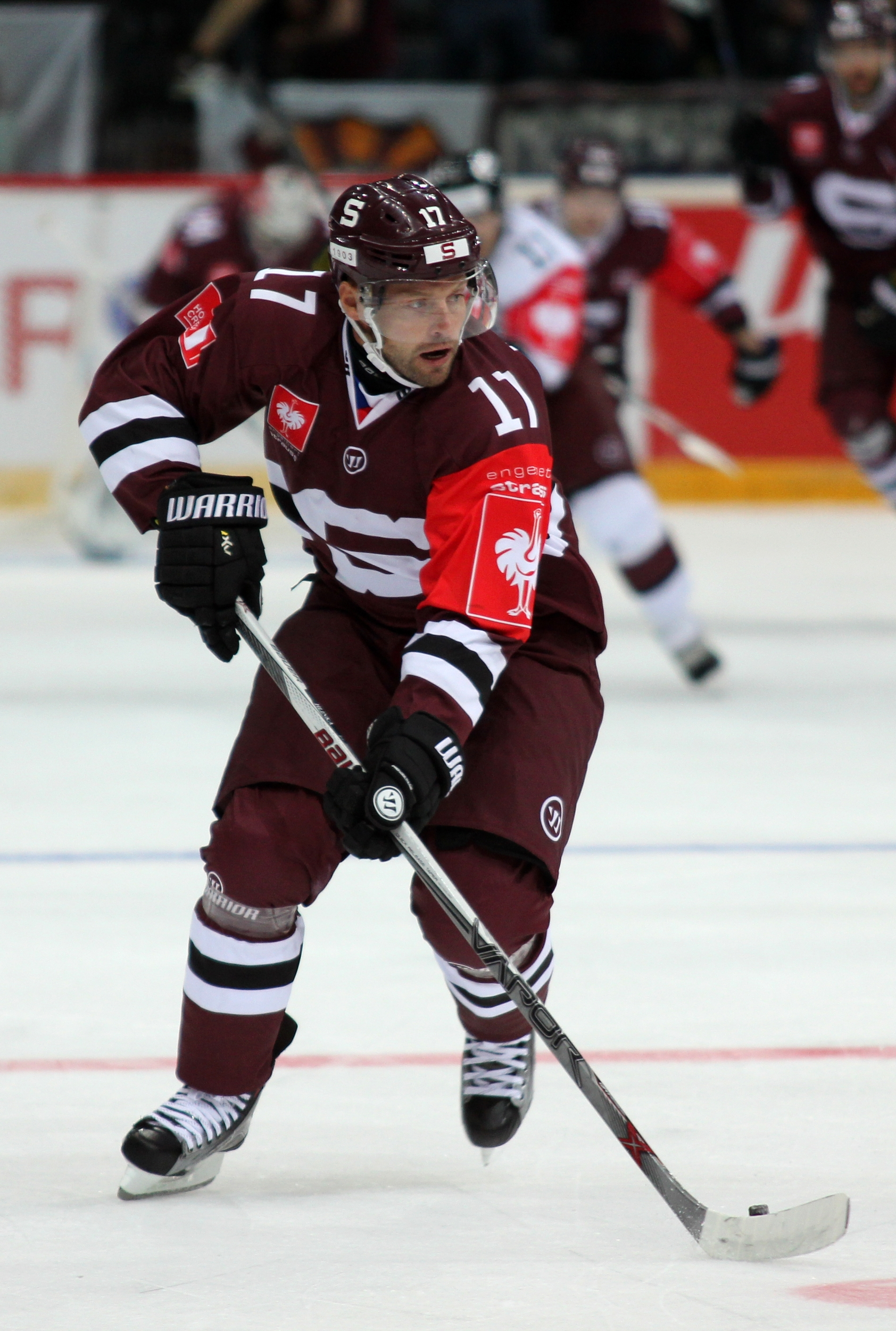 Jaroslav Hlinka (P 17).